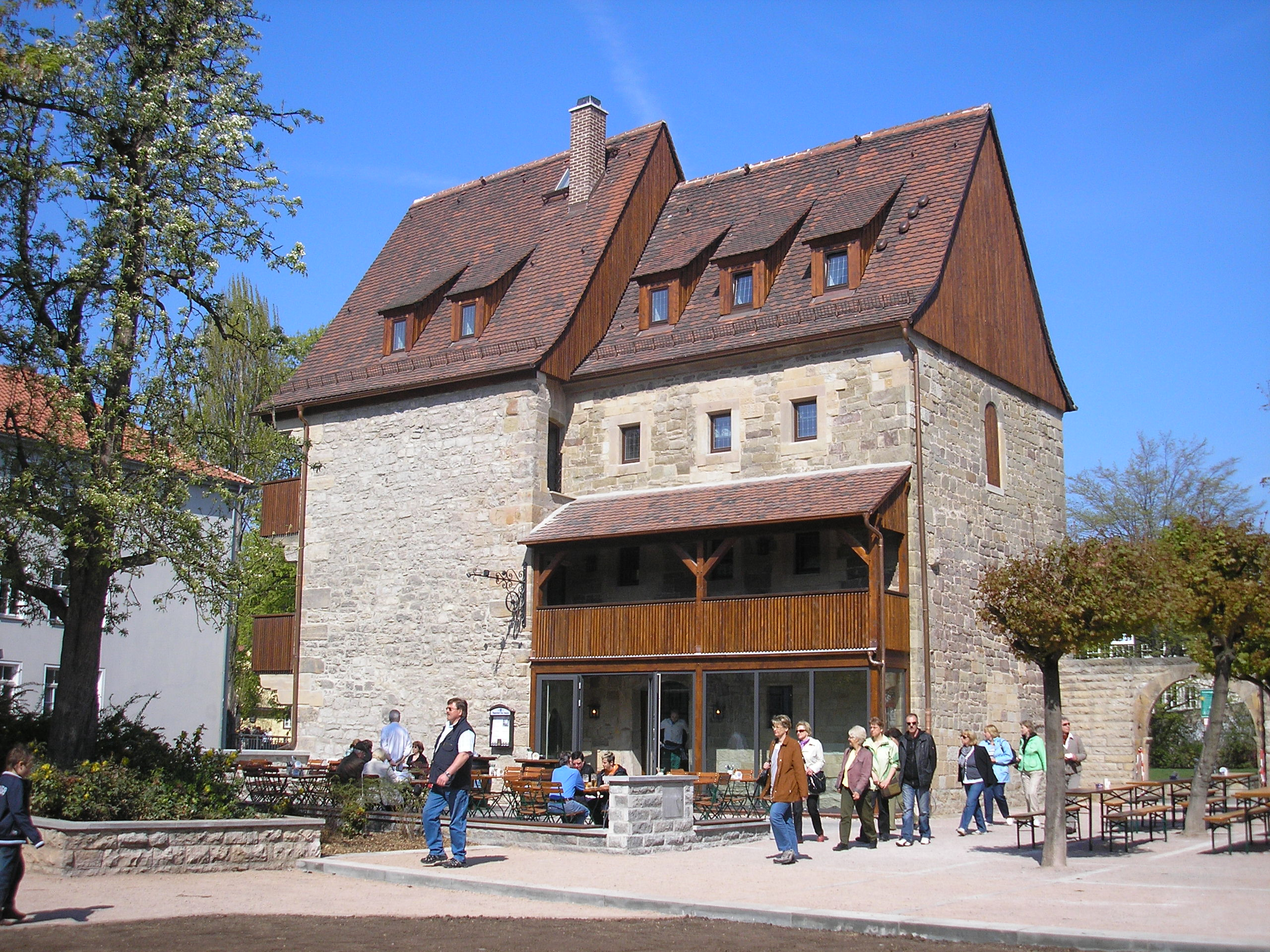 Das Hospital der alten Universität (links: "Haus zur Steinecke" / rechts: "Haus zur güldenen Distel") in Erfurt, heute das Restaurant "Augustiner an der Krämerbrücke".